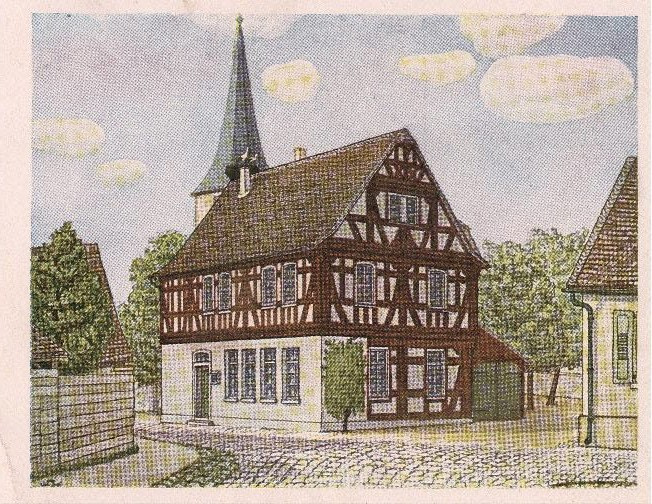 Pfungstadt-Eschollbrücken, Rathaus aus dem 16. Jahrhundert, Postkarte